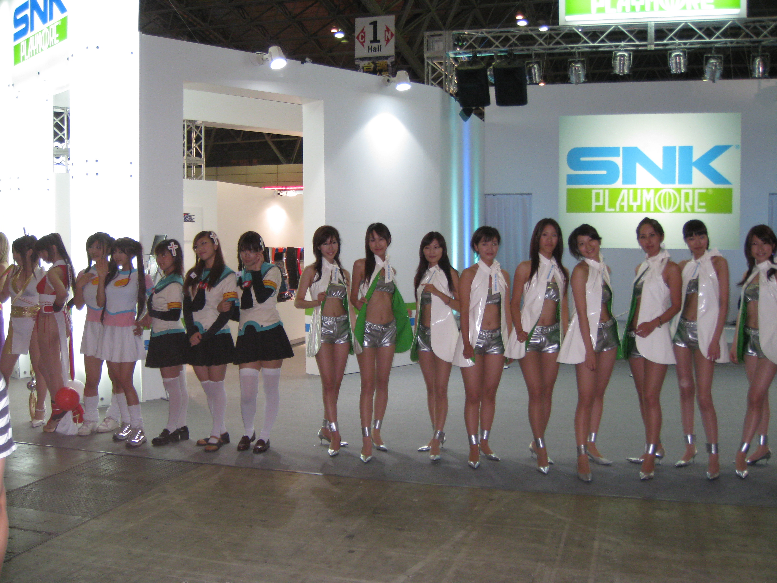 2007東京電玩展，SNK Playmore攤位的宣傳模特兒。